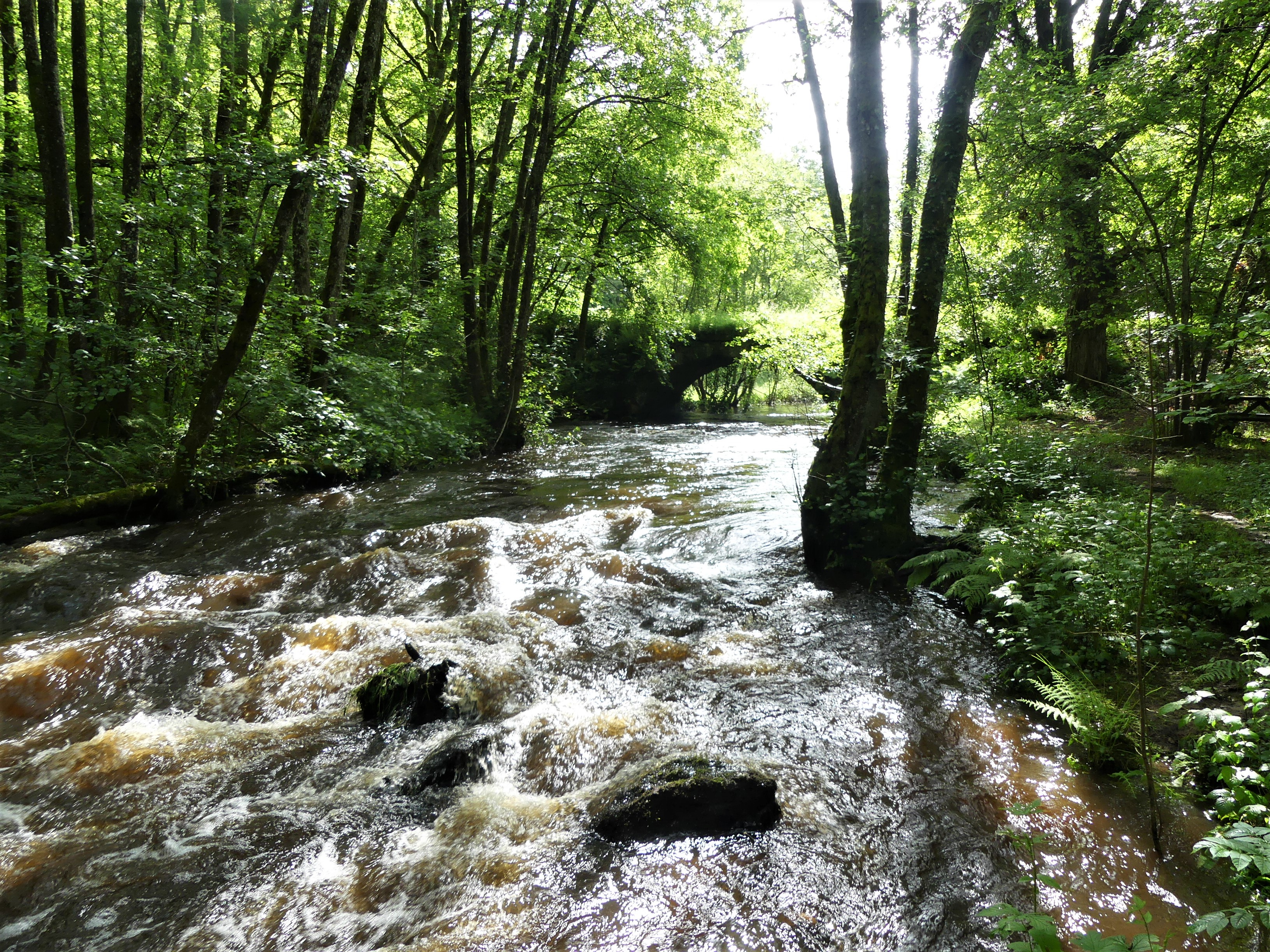 La Gosne en aval du pont-Périt (visible au fond), Saint-Hilaire-le-Château, Creuse, France.